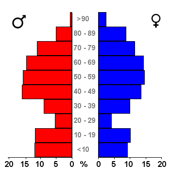 Age pyramids for the 443 municipalities in the Netherlands. Data 2007. Statistics provided by Centraal Bureau voor de Statistiek, Voorburg/Heerlen. Source: Tabel: Bevolking Nederland per gemeente en diverse regio's naar leeftijd, geslacht en burgerlijke staat, 1 januari 1988-2007. Gewijzigd op 24 mei 2007 (on-line database StatLine) Bevolkingspiramide - Gemeente Laren (2007).png